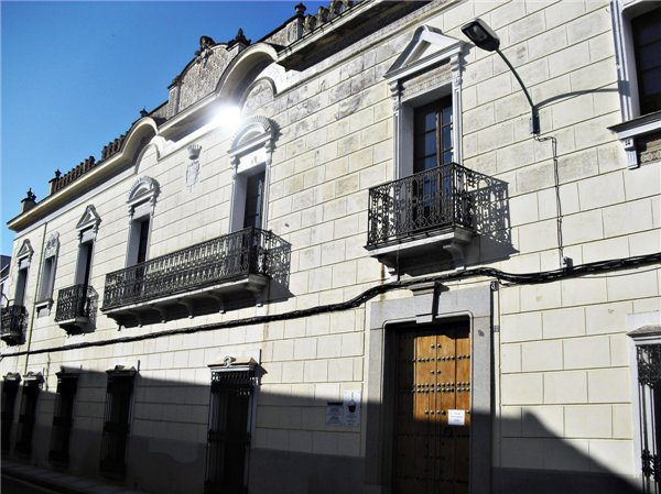 Fachada y antigua entrada al Museo Etnográfico de la ciudad.